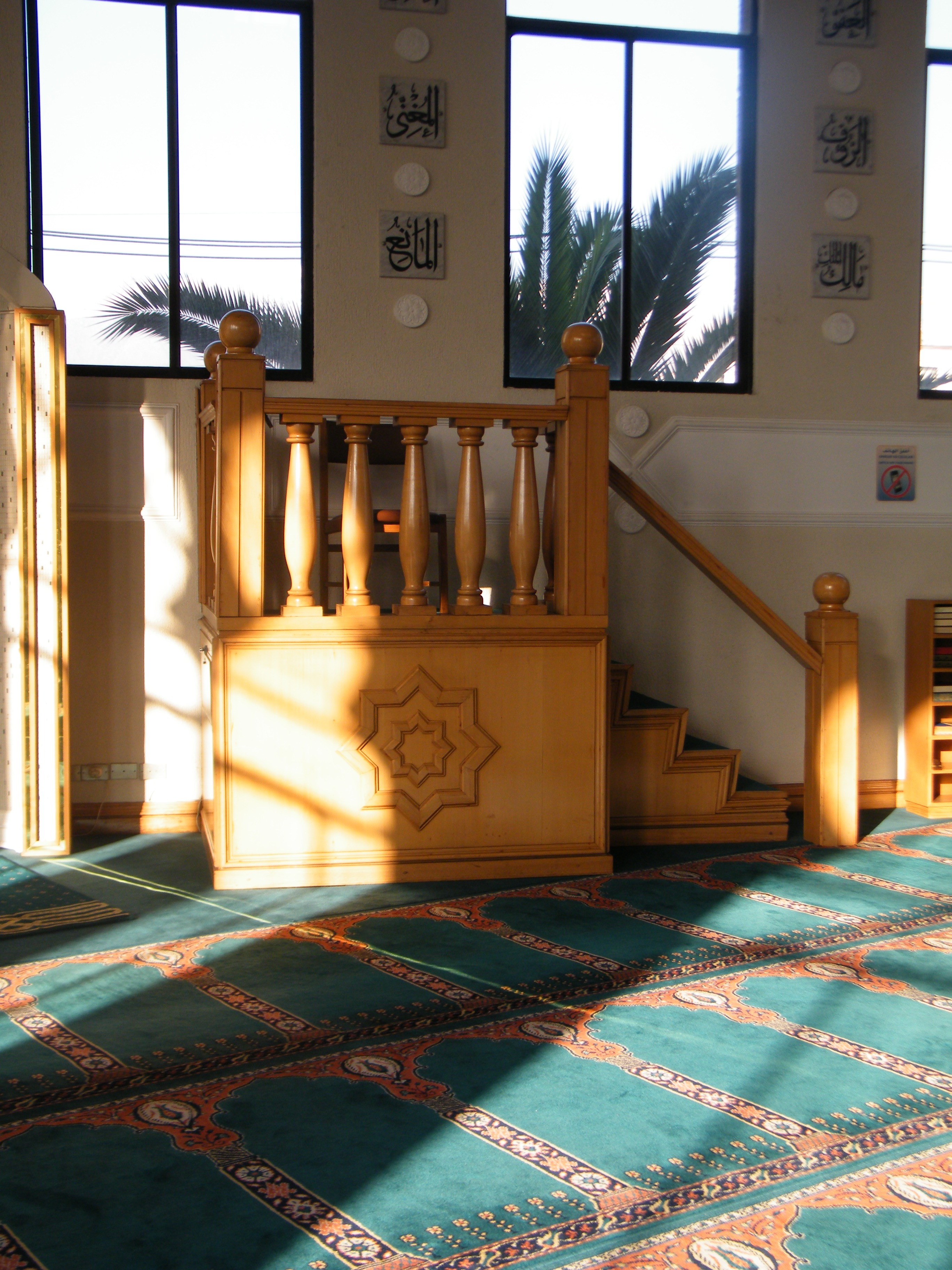 fotoiglesia1